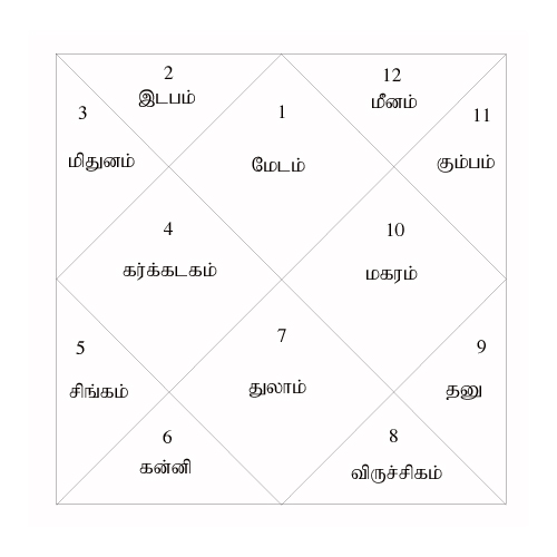 பகுப்பு:தமிழில் விளக்க வரைபடங்கள்